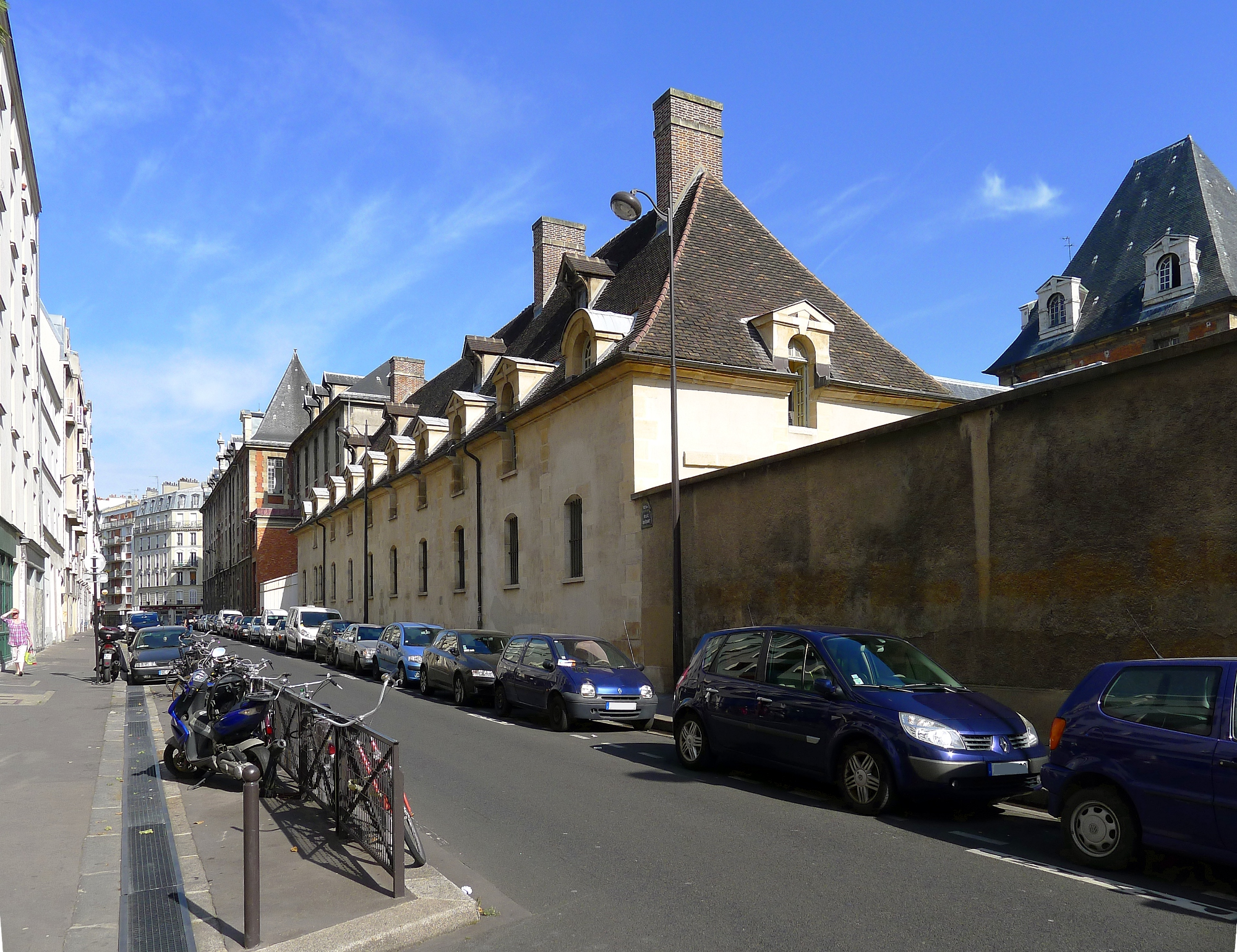 Rue Bichat (hôpital Saint-Louis) - Paris X